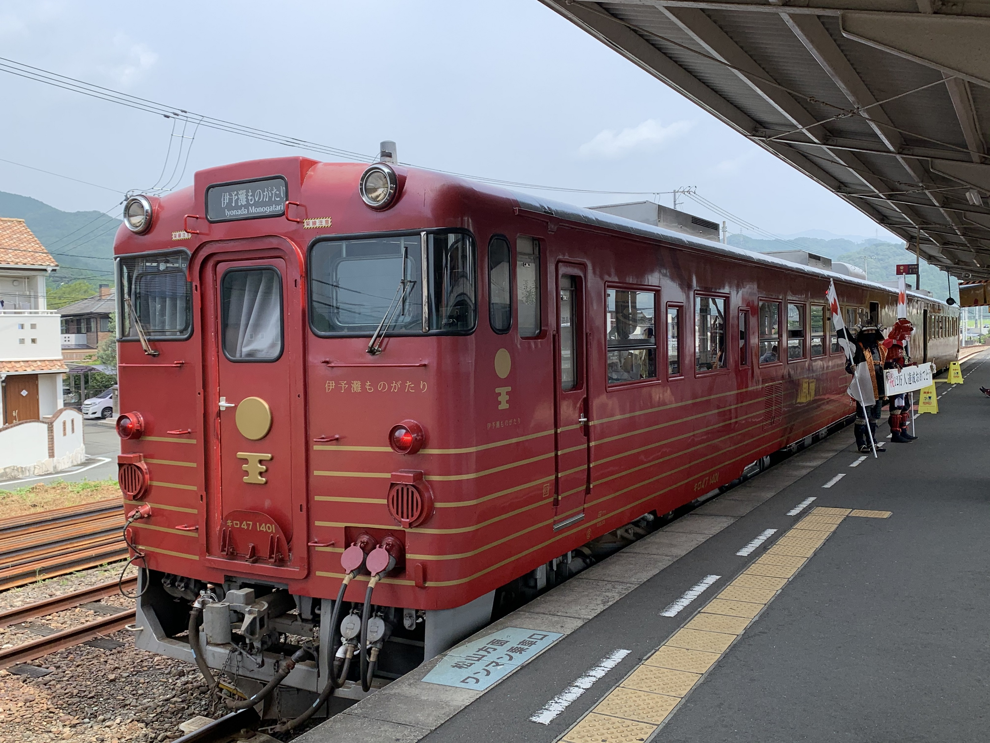 伊予大洲駅停車中の伊予灘ものがたり